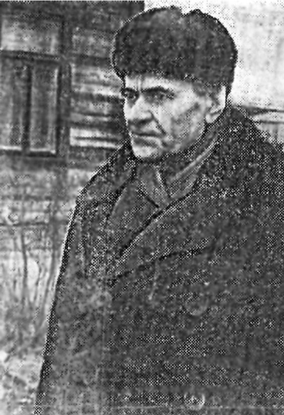 Беларуская (тарашкевіца): Антон Сокал-Кутылоўскі каля сваёй хаты ў Ганцавічах, 1942—1943 гг.